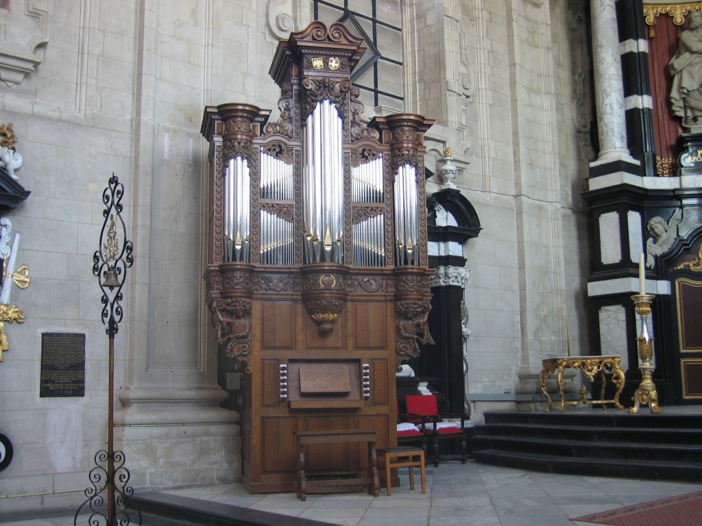 Eigen foto